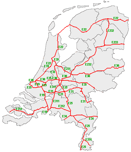 E-wegen in Nederland, zelf gemaakt